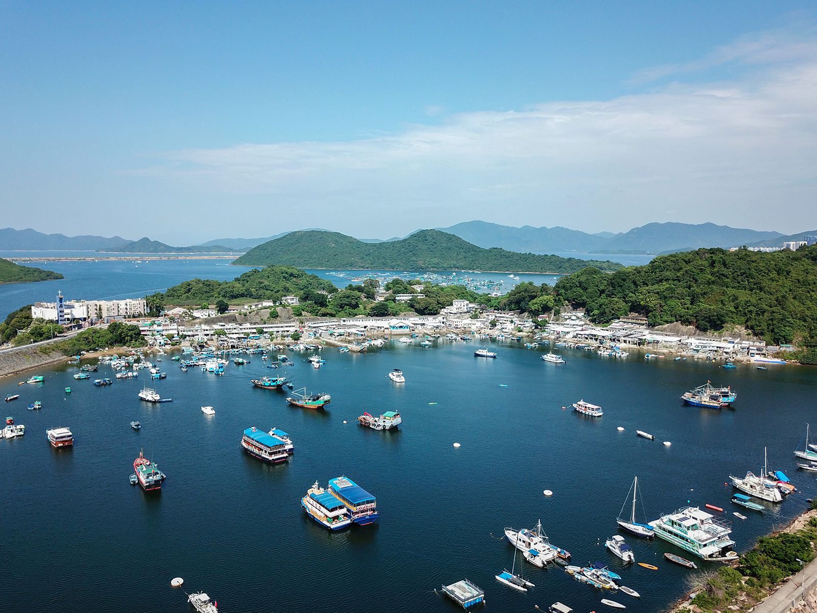 Sam Mun Tsai